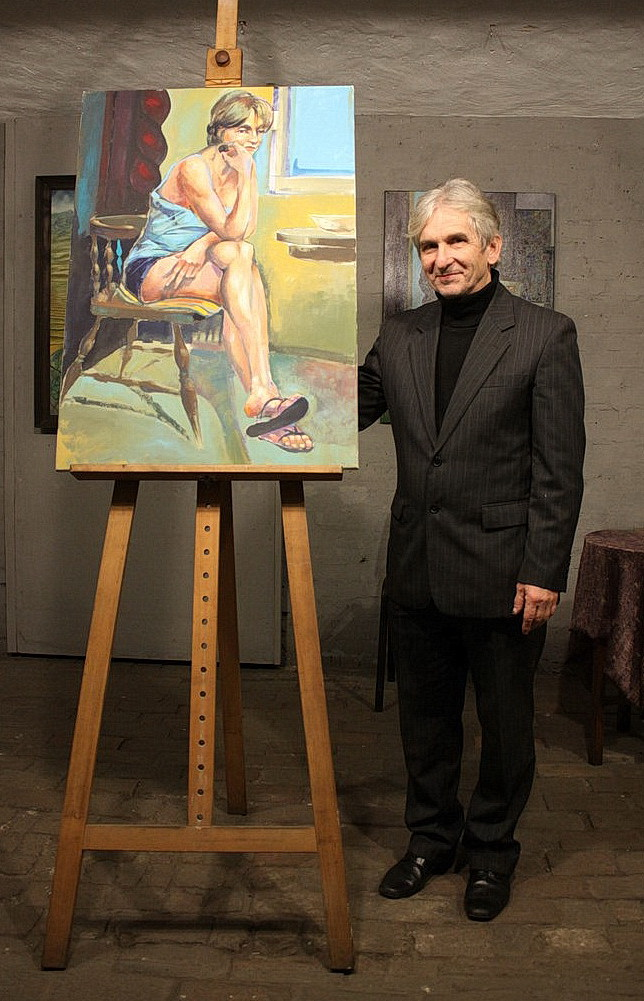 J. Kaja podczas wieczoru autorskiego z jedną ze swoich prac. (X 2016)